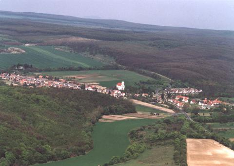 Pula, Hungary, aerialphotography